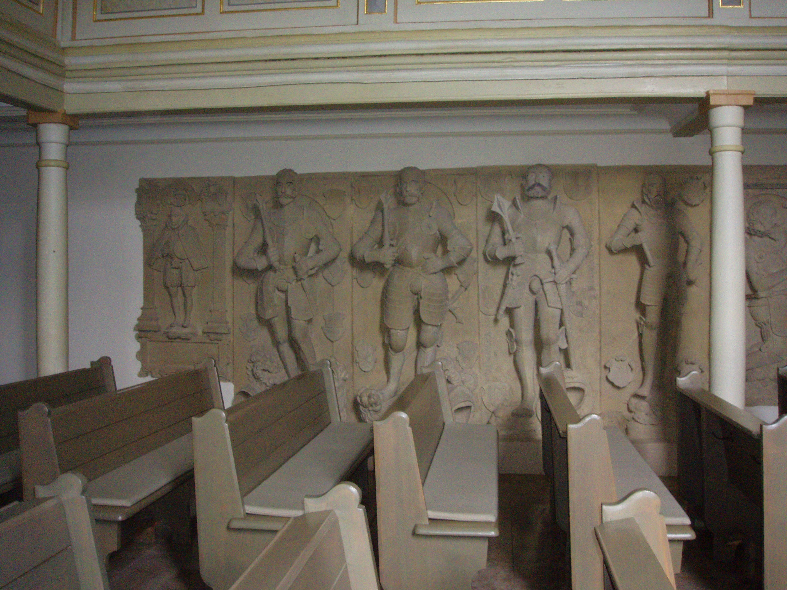 Dürnau, St. Cyriak